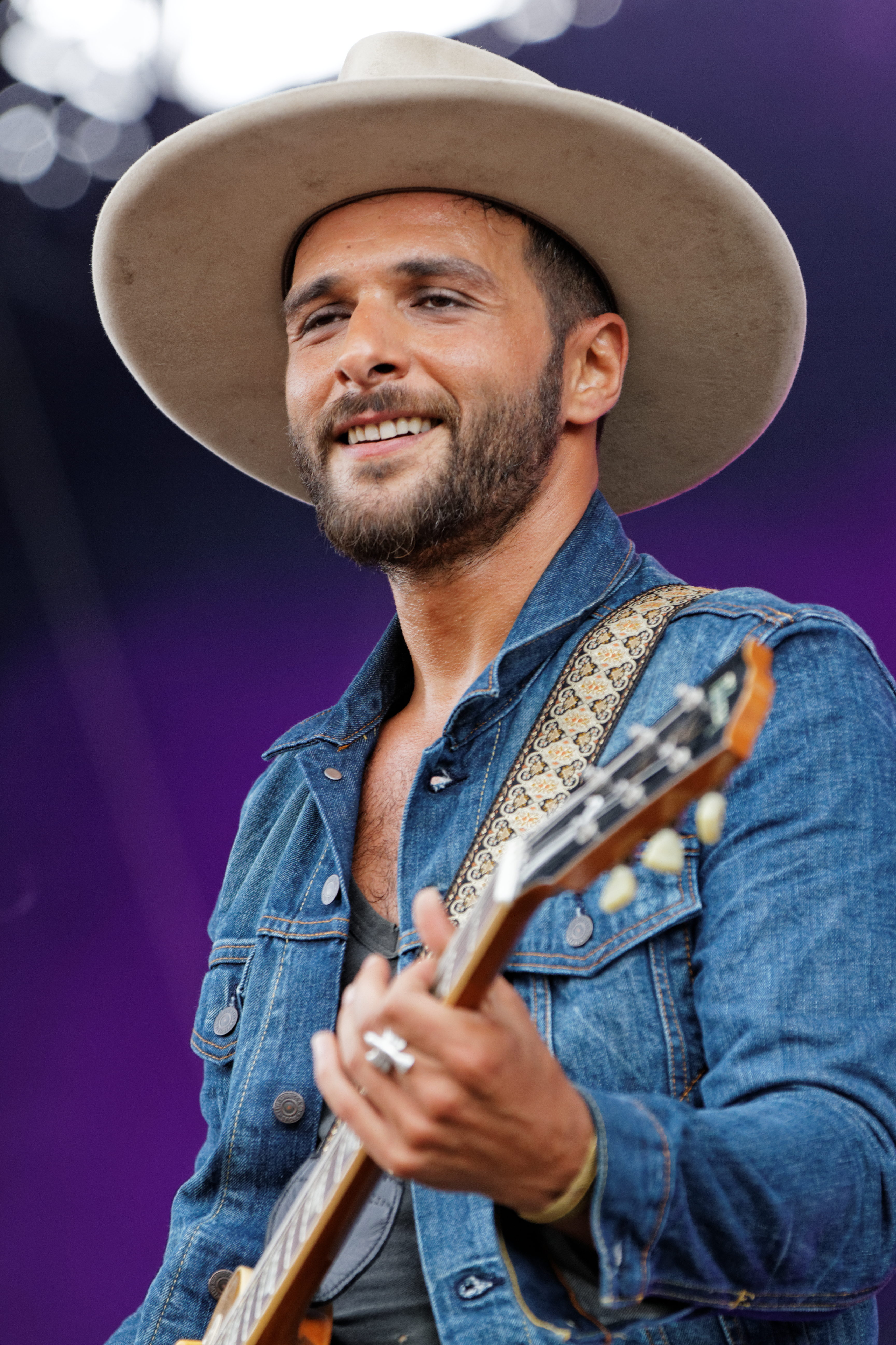 Yodelice en concert sur la scène Kerouac lors du festival des Vieilles Charrues 2014.